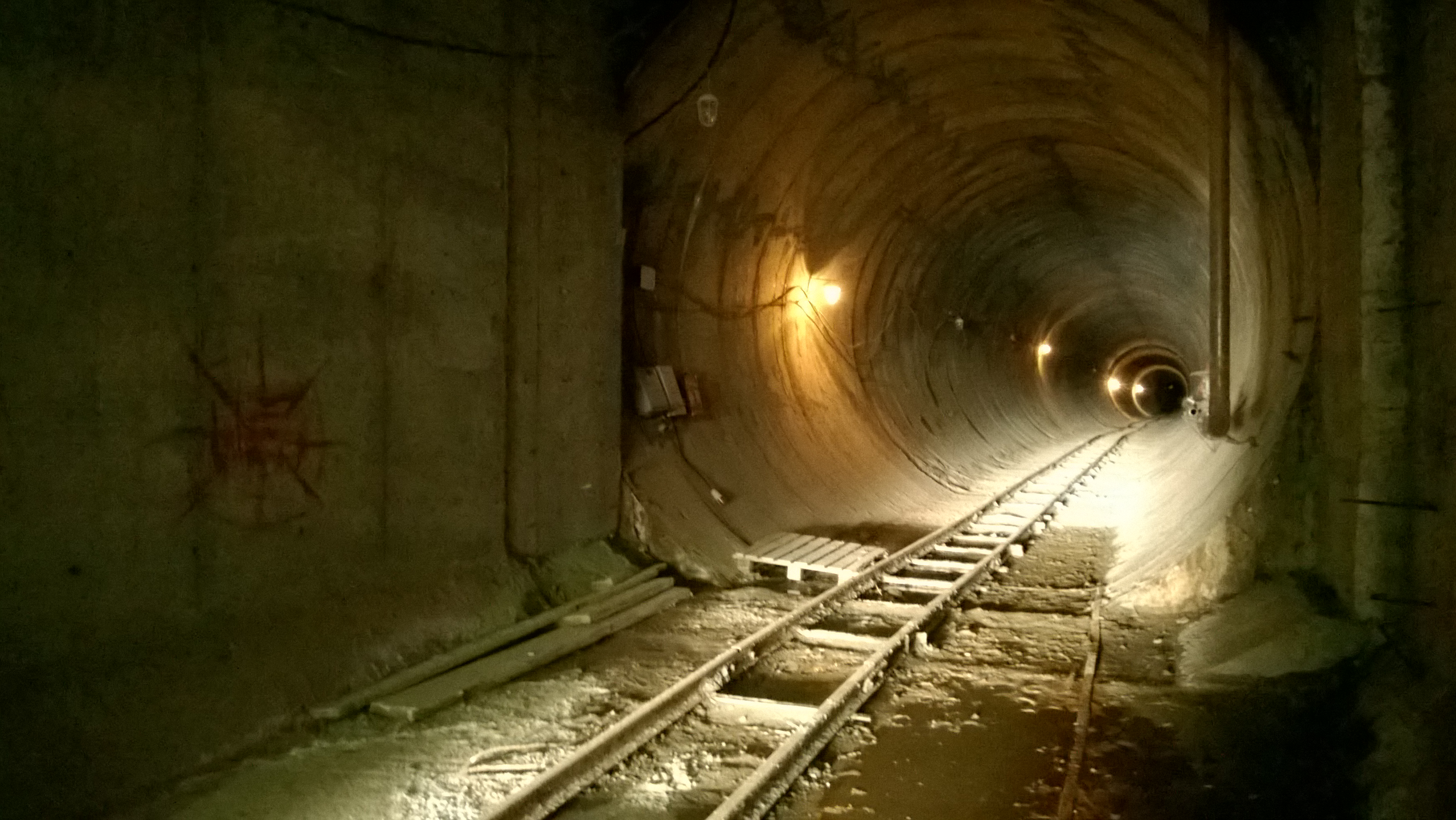 Вход в один из туннелей омского метро.